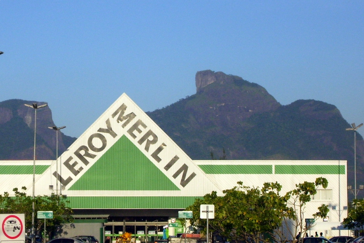 Loja da Leroy Merlin na Barra da Tijuca, Rio de Janeiro, RJ, Brasil.